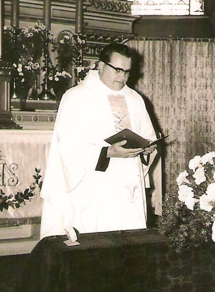 R.D. Josef Dobiáš kolem roku 1975